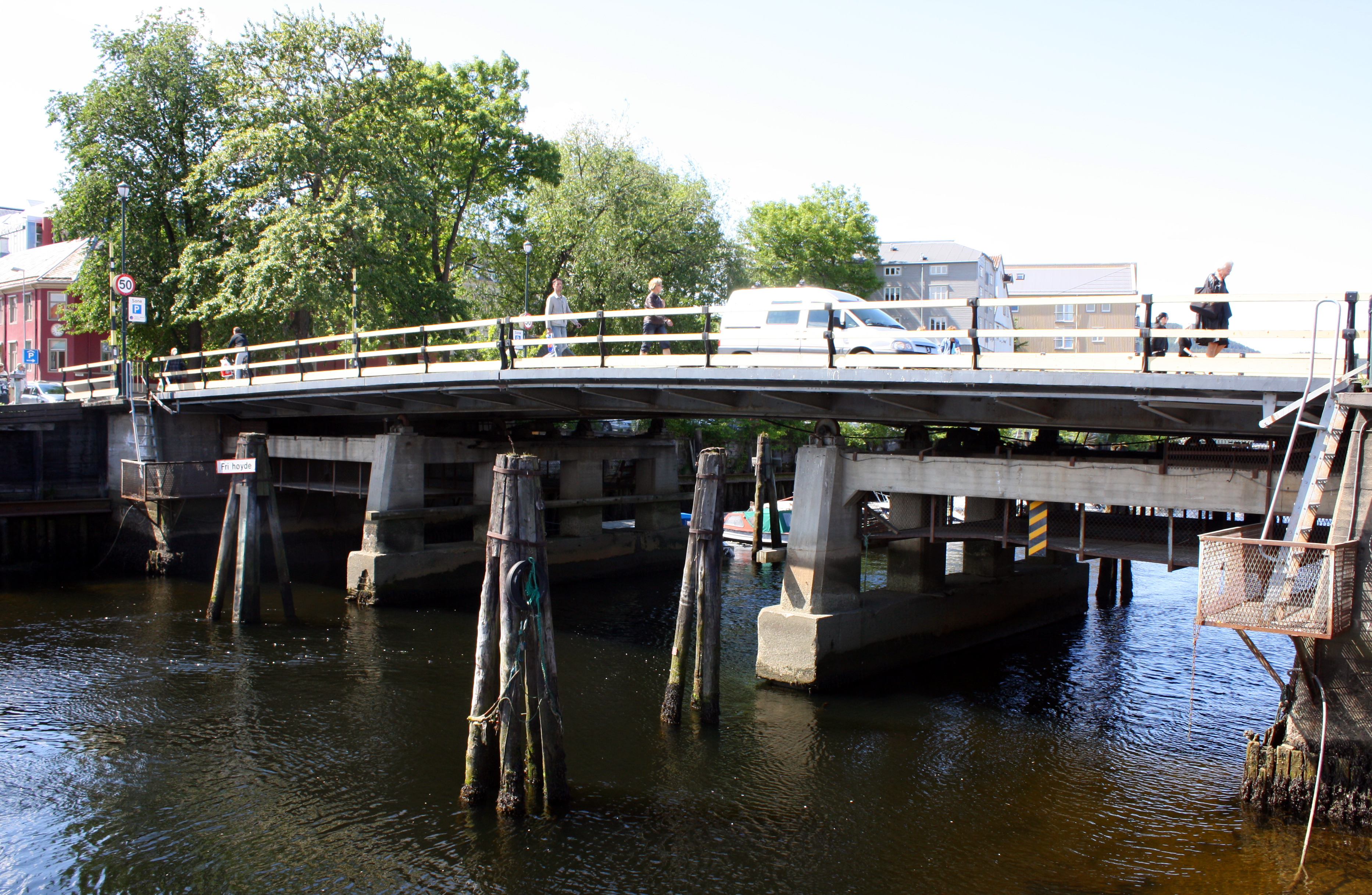 Brattørbrua